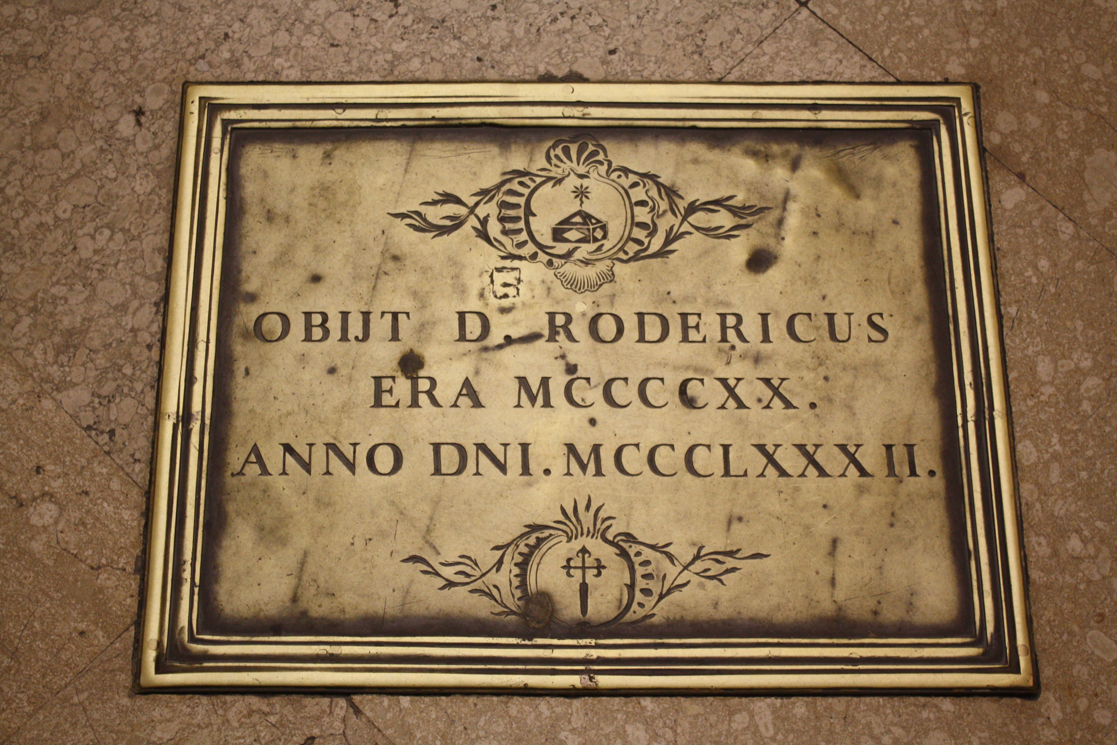 Sepulcro de Rodrigo de Moscoso († 1382), arzobispo de Santiago de Compostela entre 1367 e 1382, no chan da Catedral.